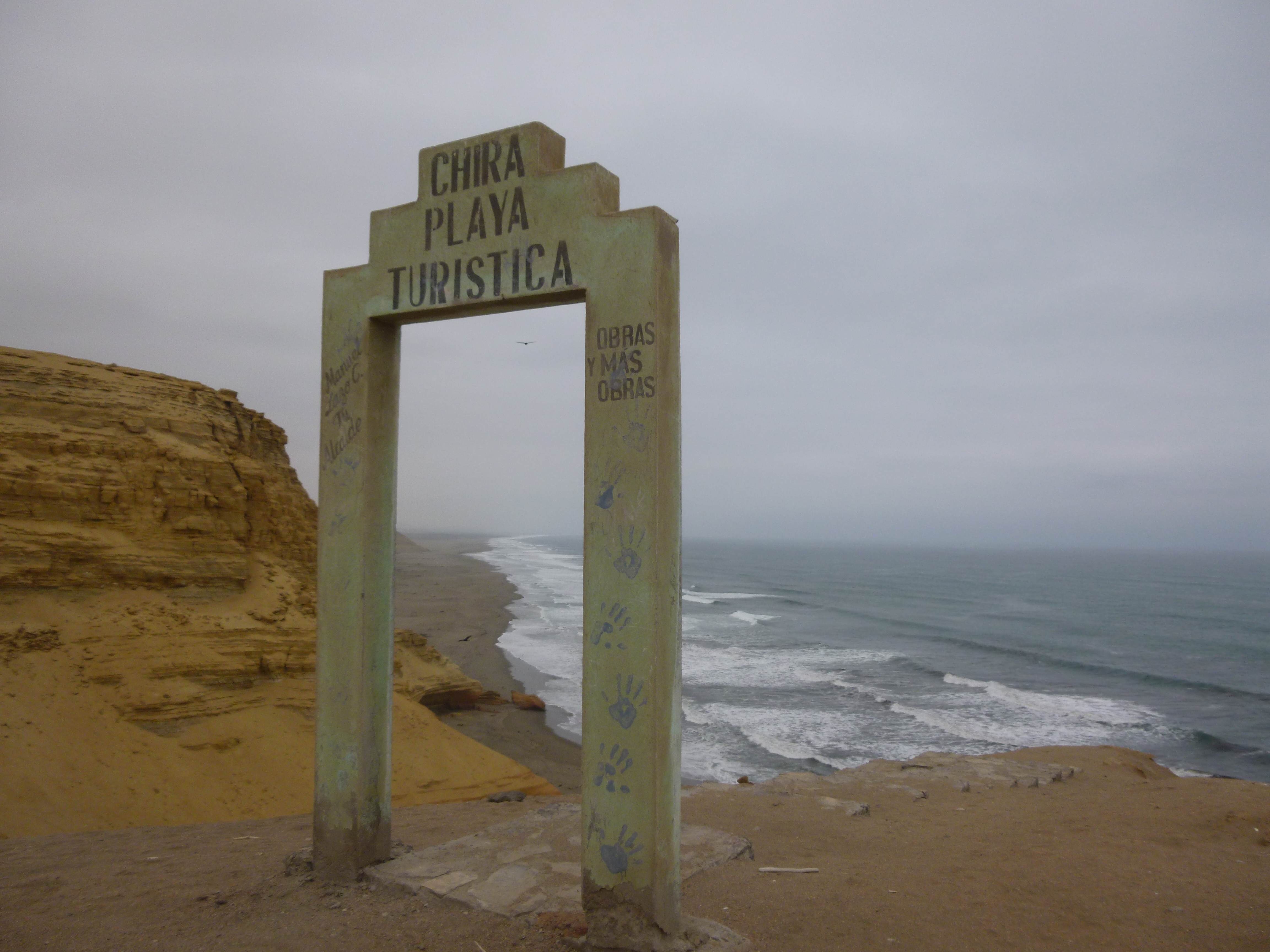 Hito que da la bienvenida a Playa Chira, cerca a la ciudad de Camaná, Arequipa.